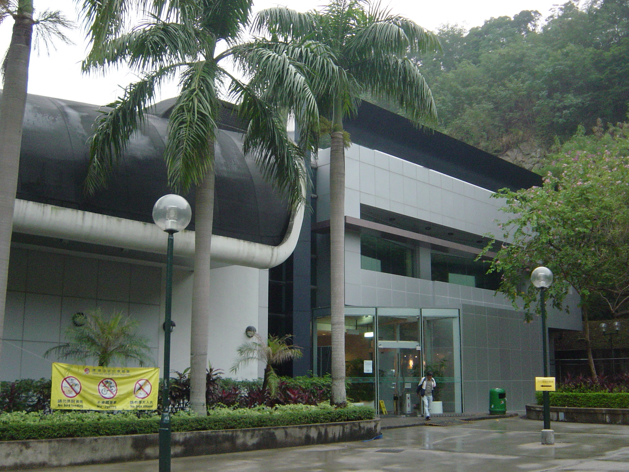 香港主要粵劇表演場地之一－－高山劇場，劇場入口(日景)。Ko Shan Theatre, Hong Kong.